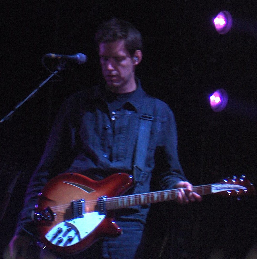 Ed O'Brien bei Rock Oz'Arénes in Avenches